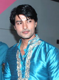 Deepika Singh, Aamir Khan and Anas Rashid